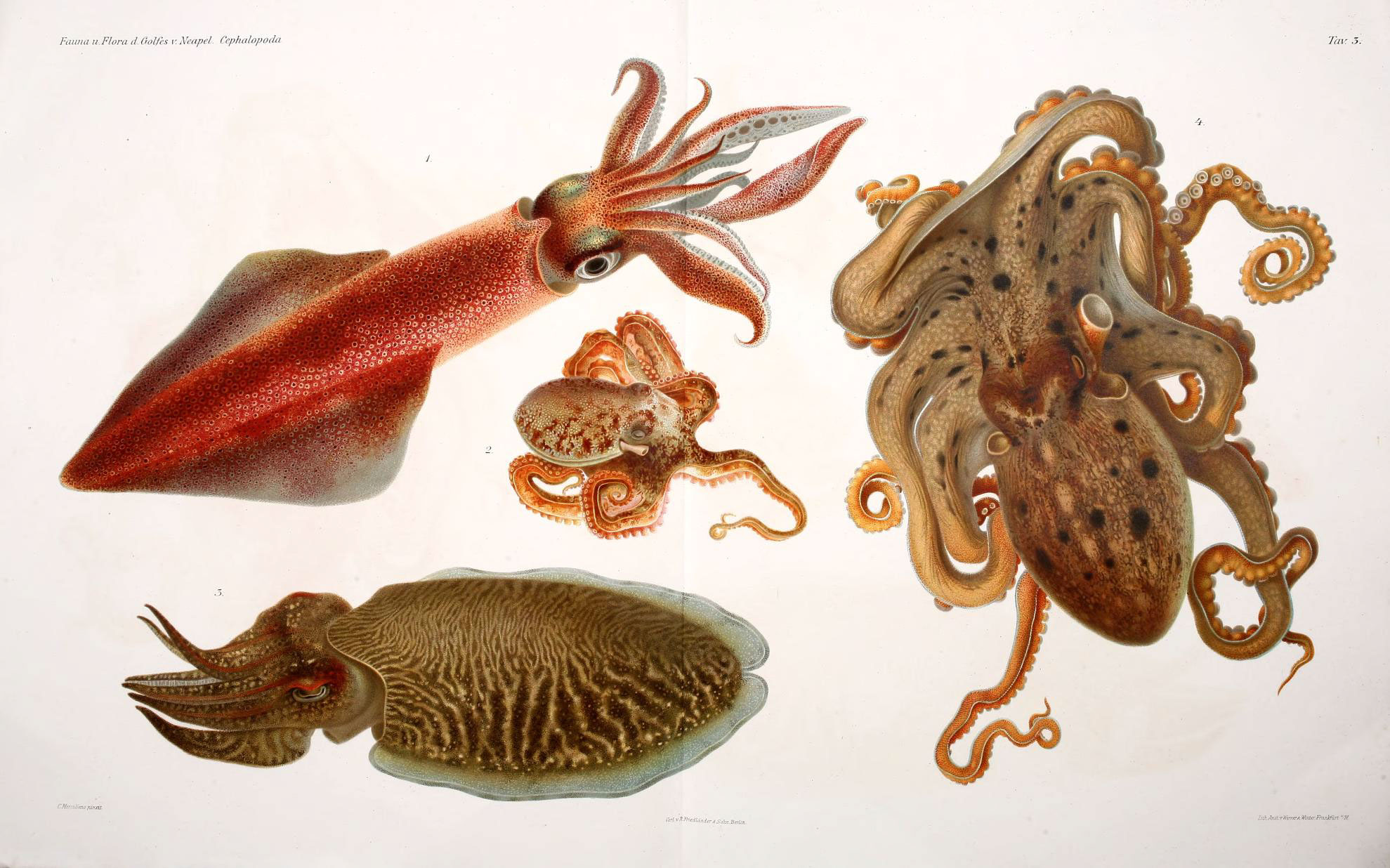 Fciwia ii.Flum d Ciolfcs r.Xeapel l"rp/mlopi.i!a Tm: 5. M '■'-'*'.llmJ,rjs^_BM^ il':/ÌTttTA'tnvr^Ai:aerfrxi!tnl:t "ff